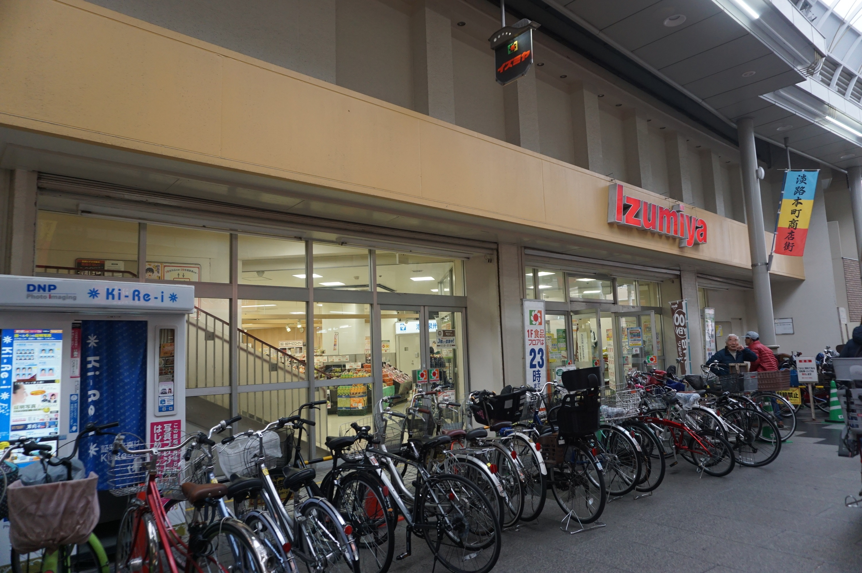 2019年3月撮影 Sony ILCE-6000